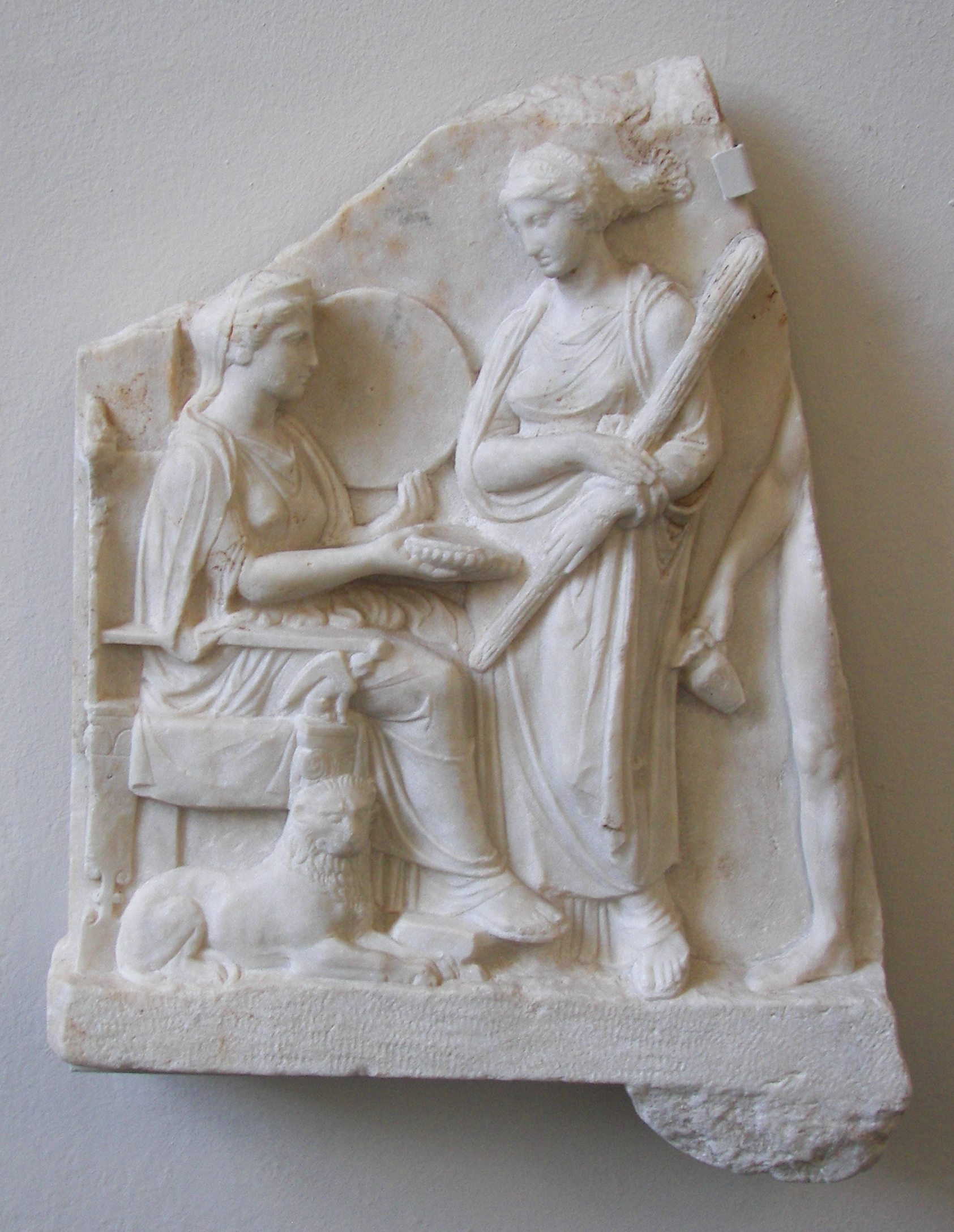 Weihrelief an Kybele, attisch, um 380/370 v. Chr., angeblich in Piräus gefunden, erworben 1877, Pentelischer Marmor, Höhe 56 cm, Breite 43 cm, SK 691 (K 106)